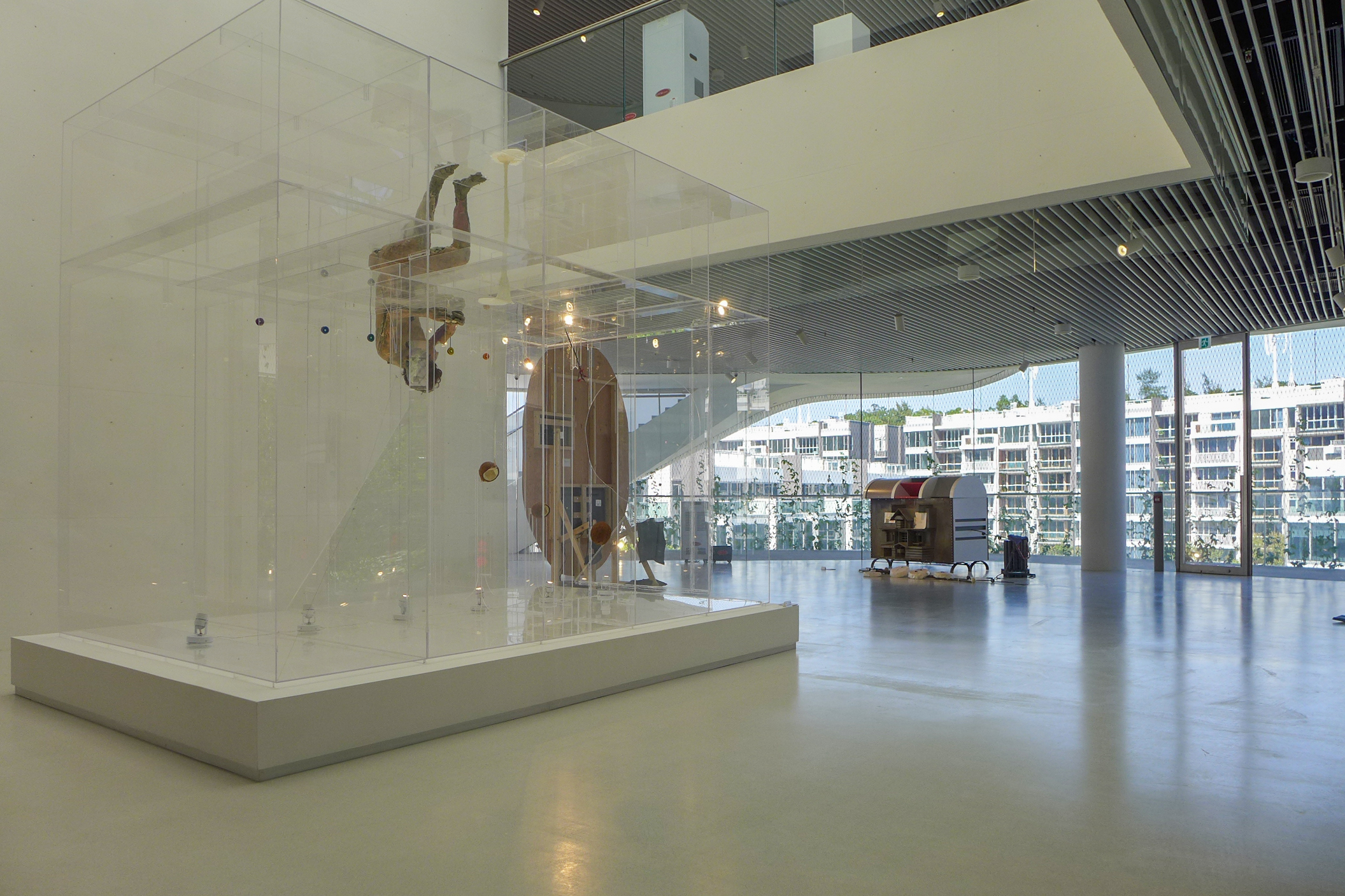 Mount Pavilia chi art space interior